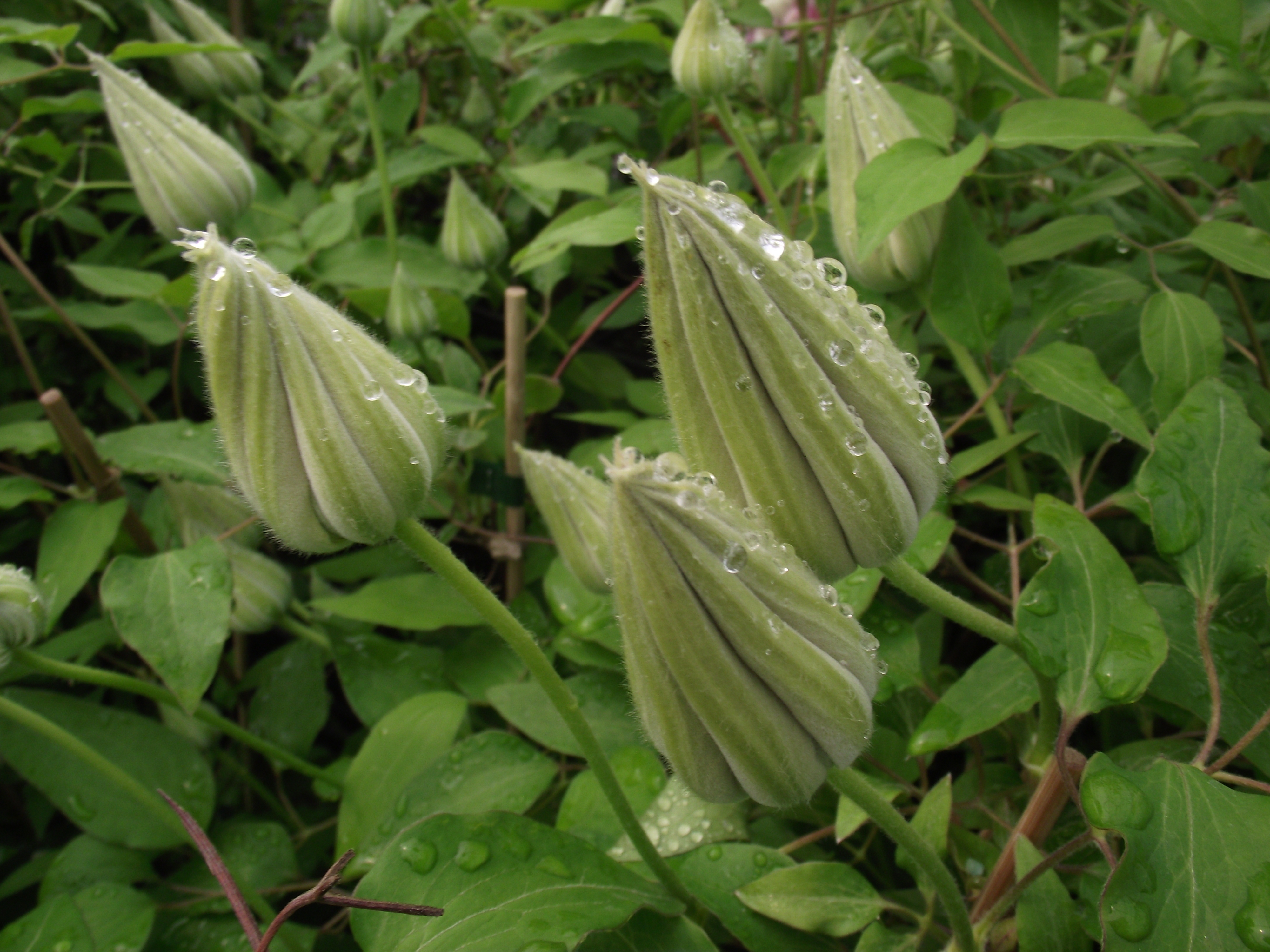 clematis patens josephine bouton florale